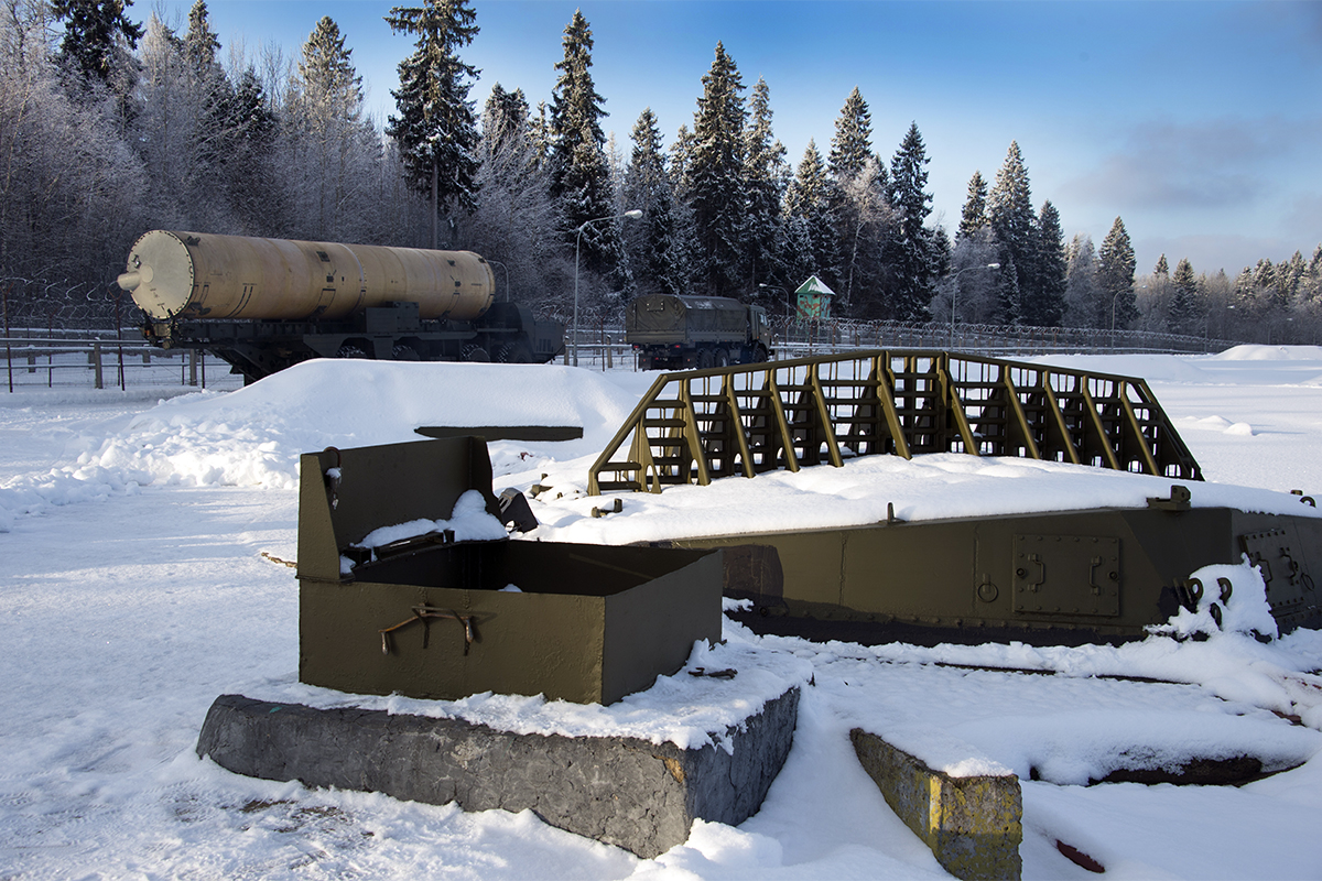 Транспортно-установочный агрегат 5Т92 комплекса противоракетной обороны А-135 «Амур» на шасси МАЗ-543М. Проведение тренировки боевыми расчётами системы ПРО 9-й дивизии противоракетной обороны.